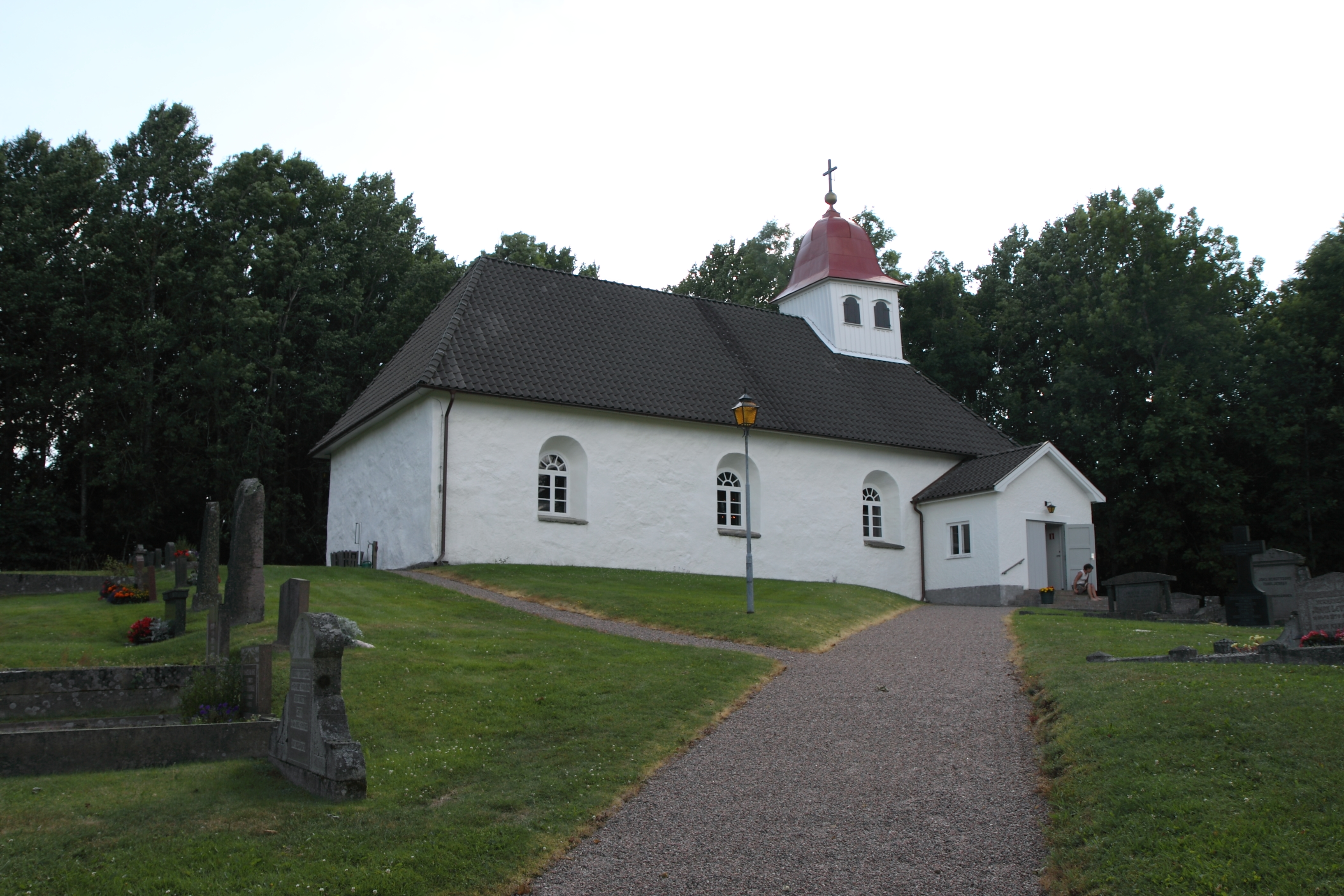 Kvinnestads kyrka.